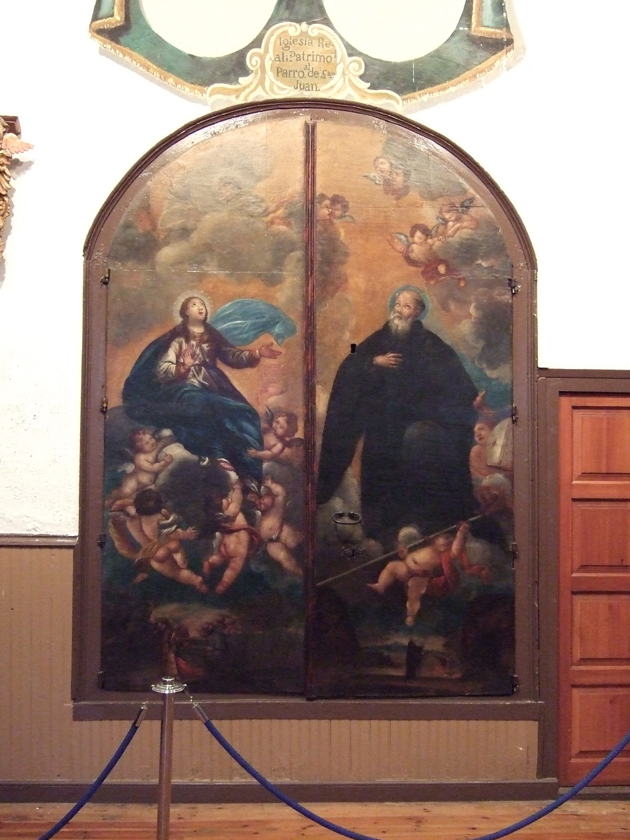 Francisco de Goya y Lucientes, Asunción de la Virgen y San Iñigo, puertas de armario; Identifican en Calatayud las primeras pintura de Goya que se conservan